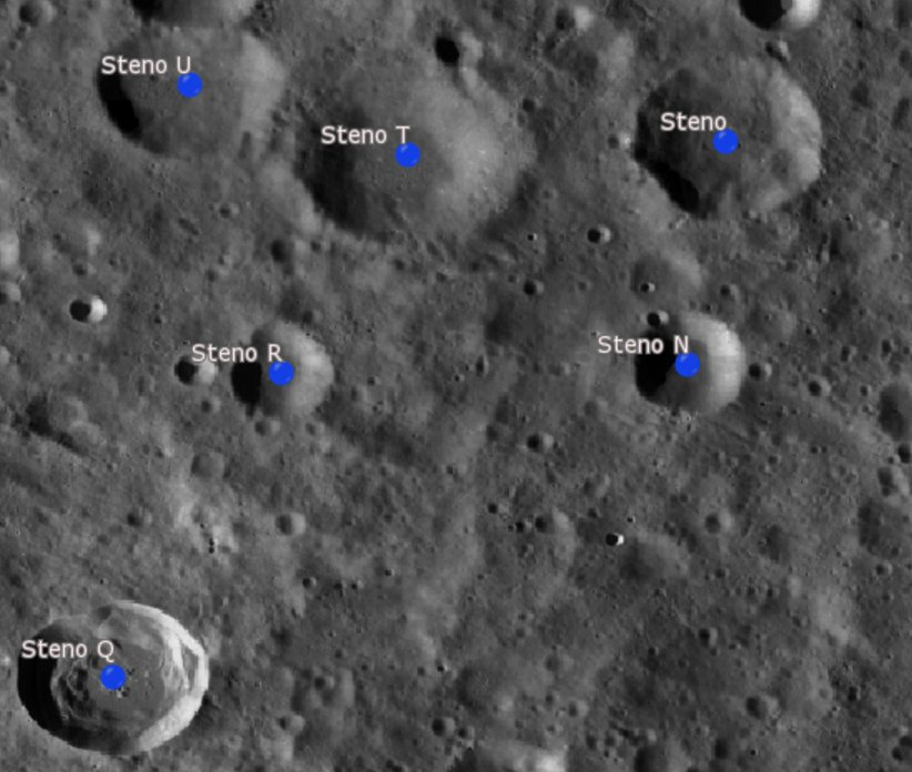 Cráter lunar Steno. Cráteres satélite. (Imagen LRO)